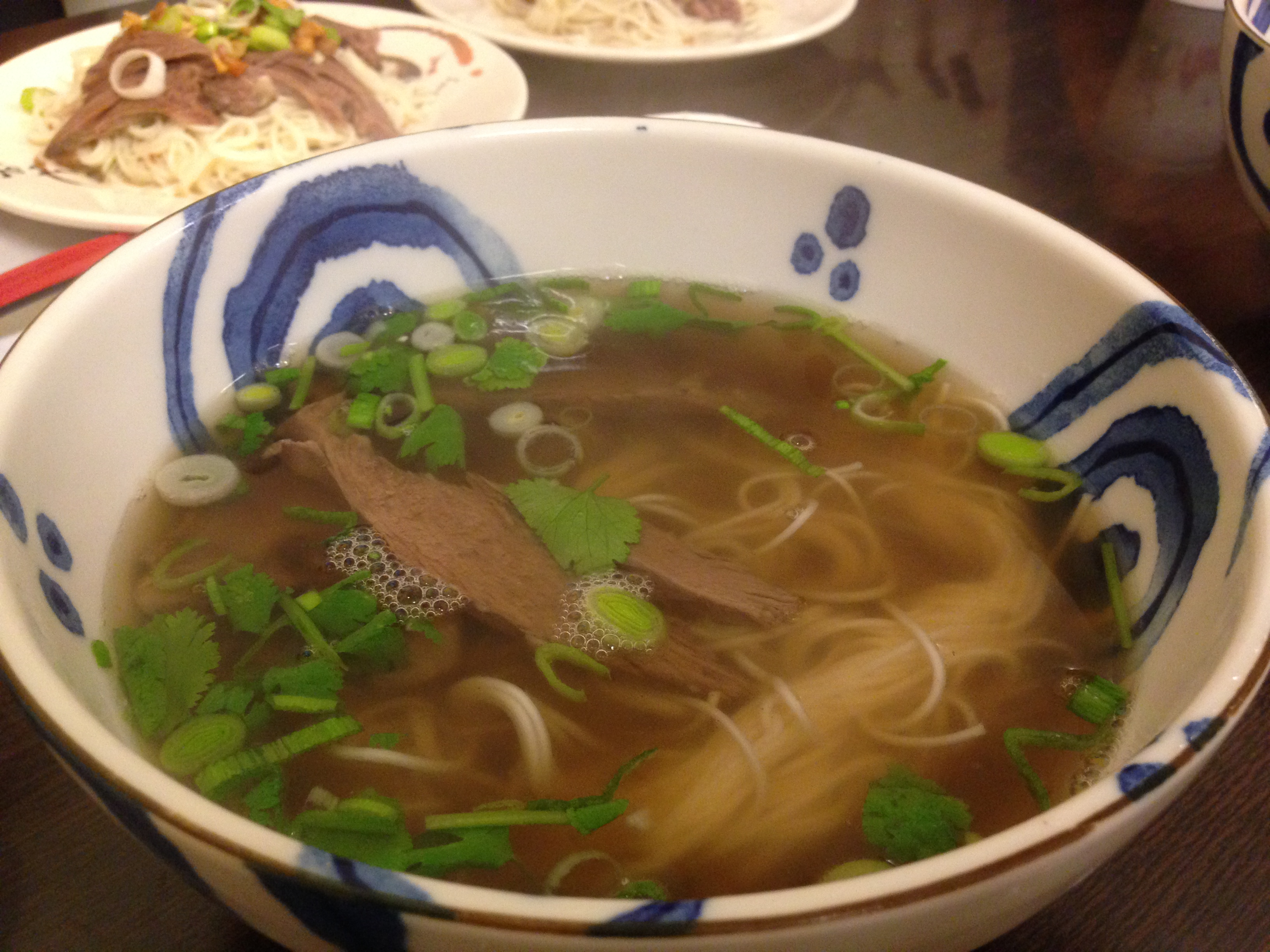 水盆羊肉, 江記水盆羊肉, 台北